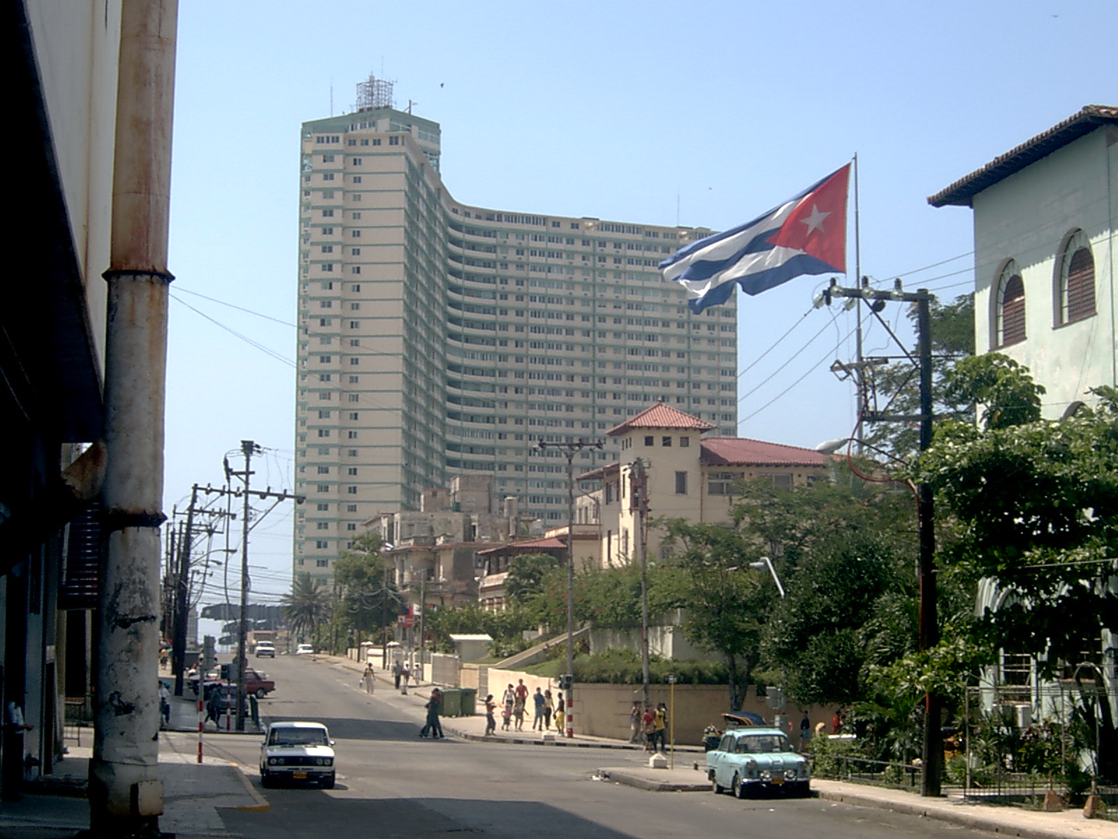 Edificio FOCSA a La Habana